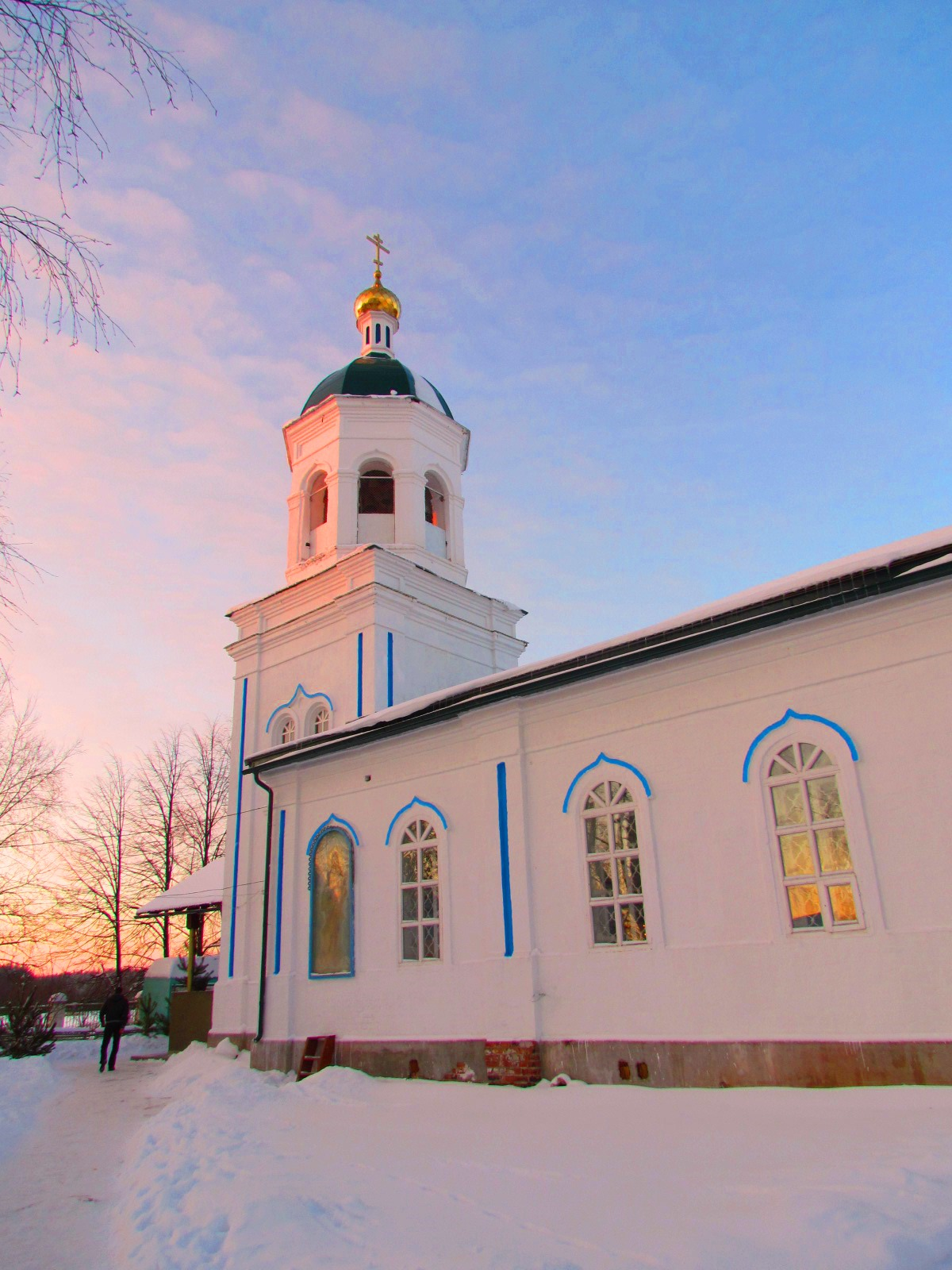 Церковь Троицы Живоначальной в Старково